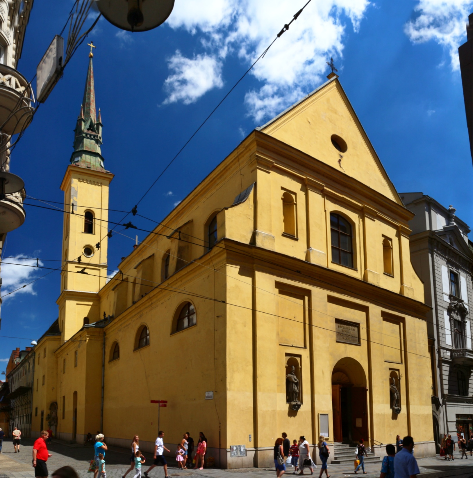 Kostel sv. Máří Magdaleny v Brně